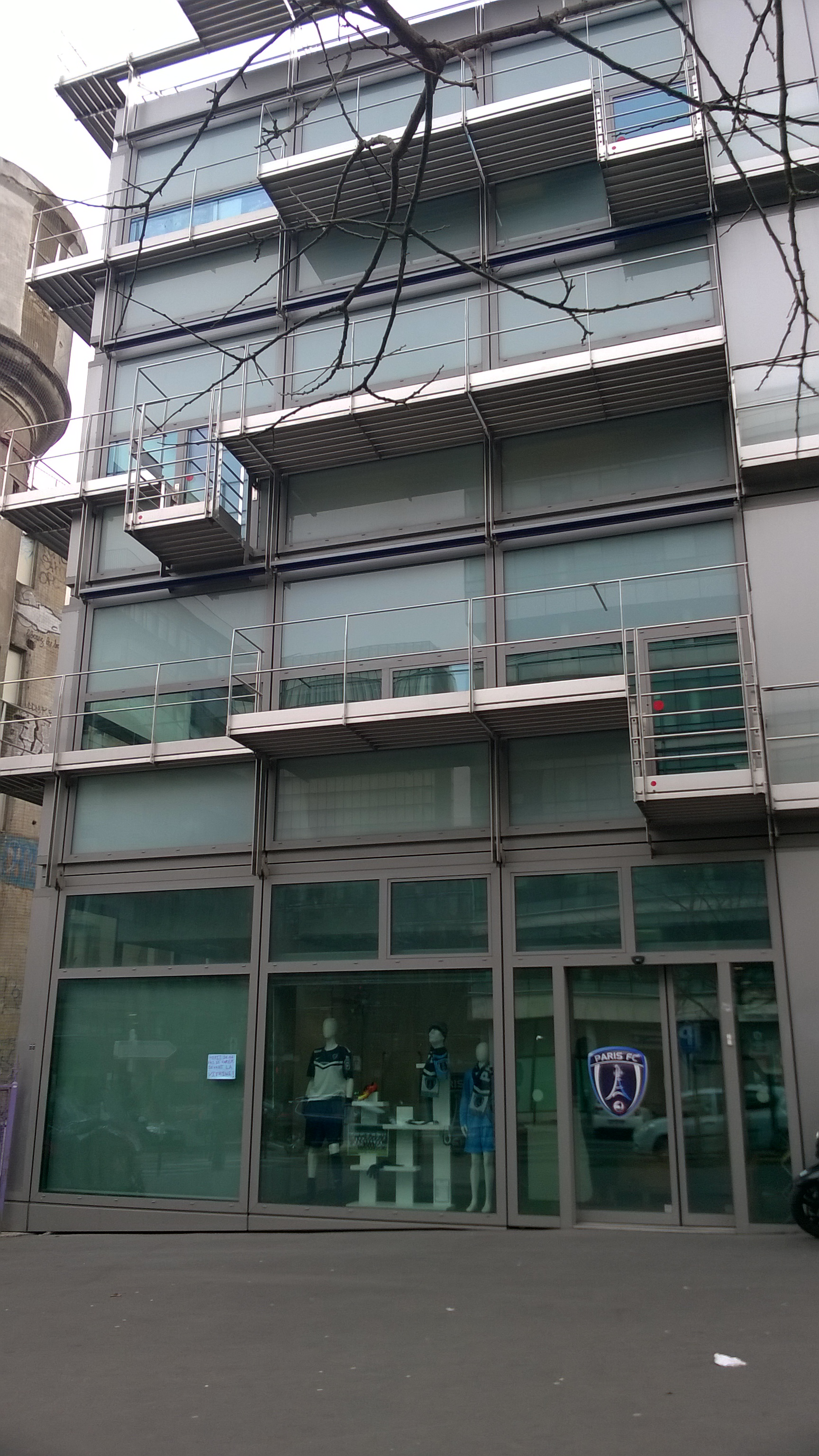 Siège social du Paris FC (17 rue neuve Tolbiac 75013)